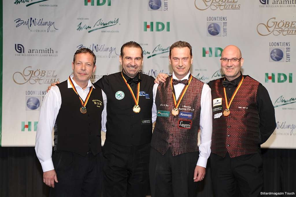 Sieger Deutsche Dreiband-Meisterschaft 2013